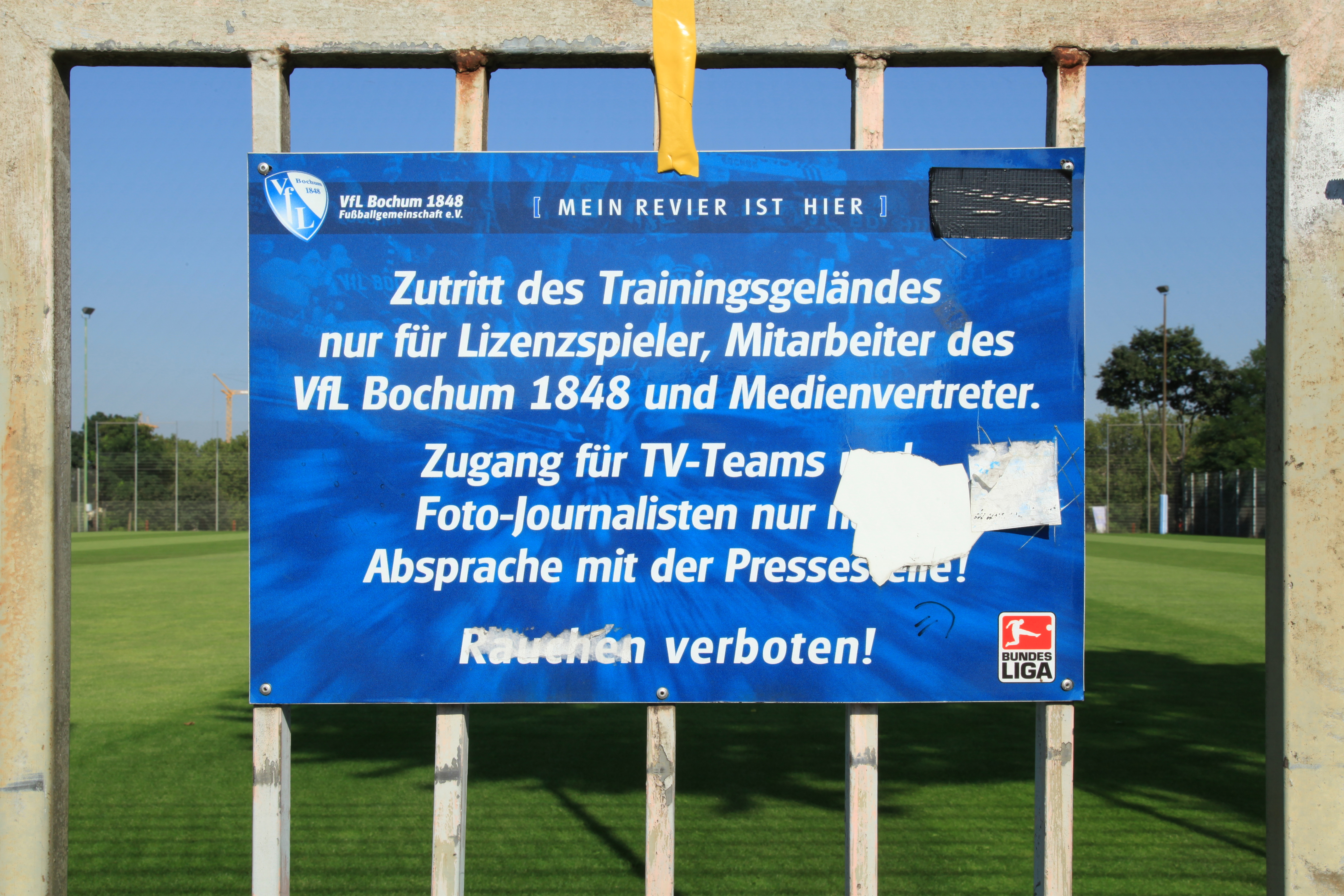 Trainingsgelände auf dem VfL-Gelände, Quellenweg in Bochum